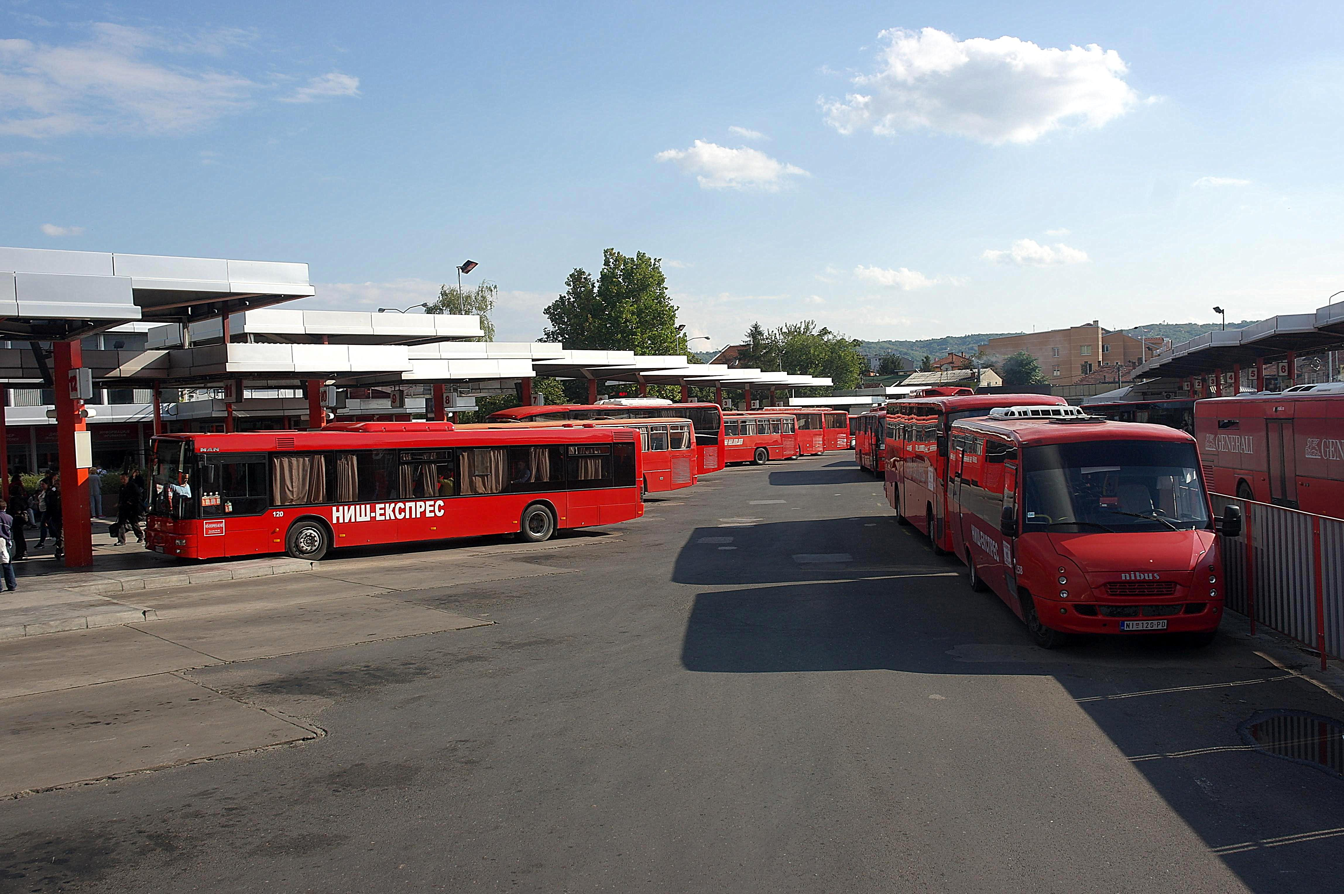 Автовокзал в Нише,Сербия